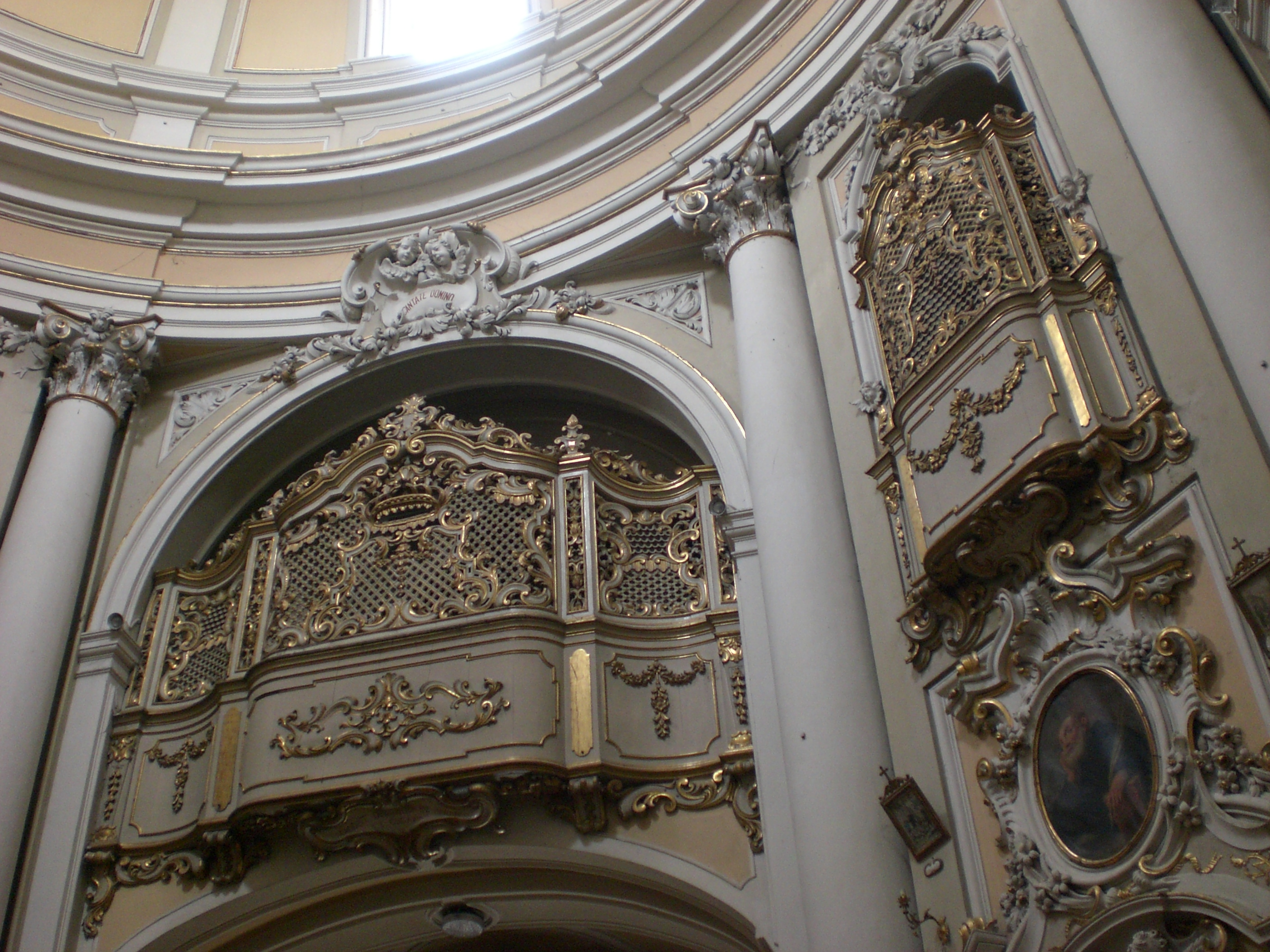 Corinaldo, Chiesa dell'Addolorata, 1740-55